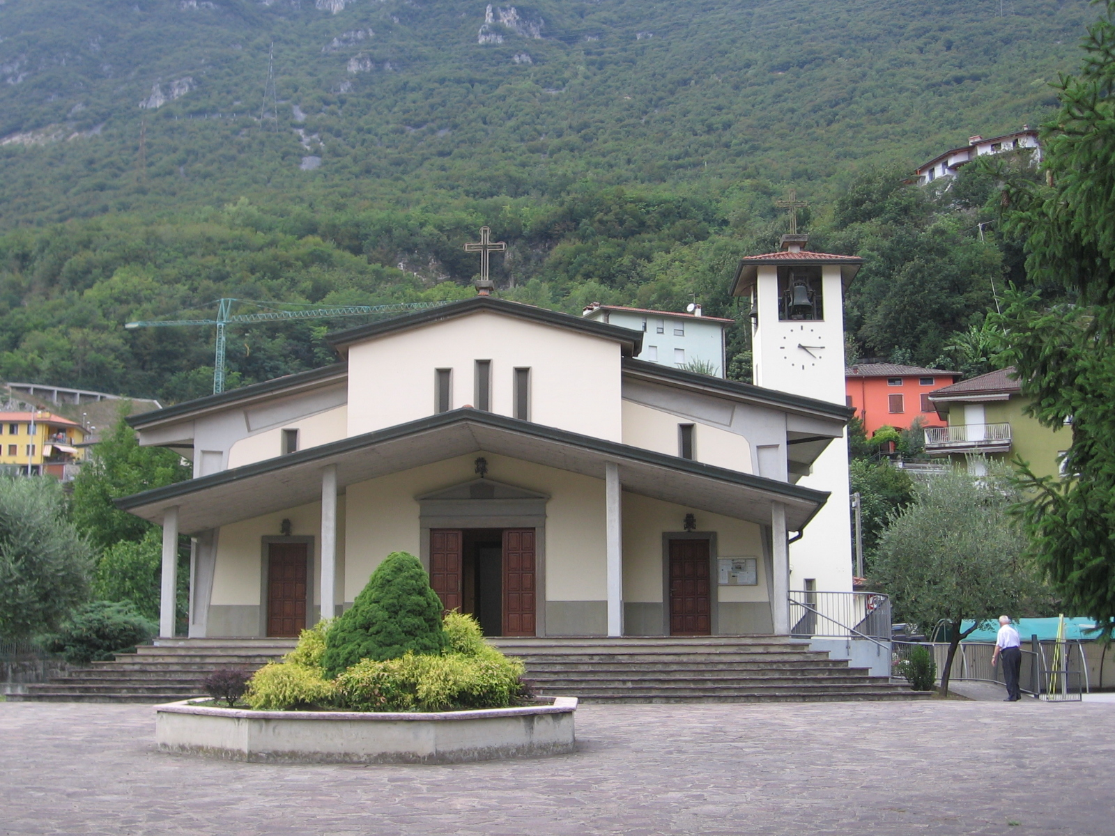 Rogno, Bergamo, Italy